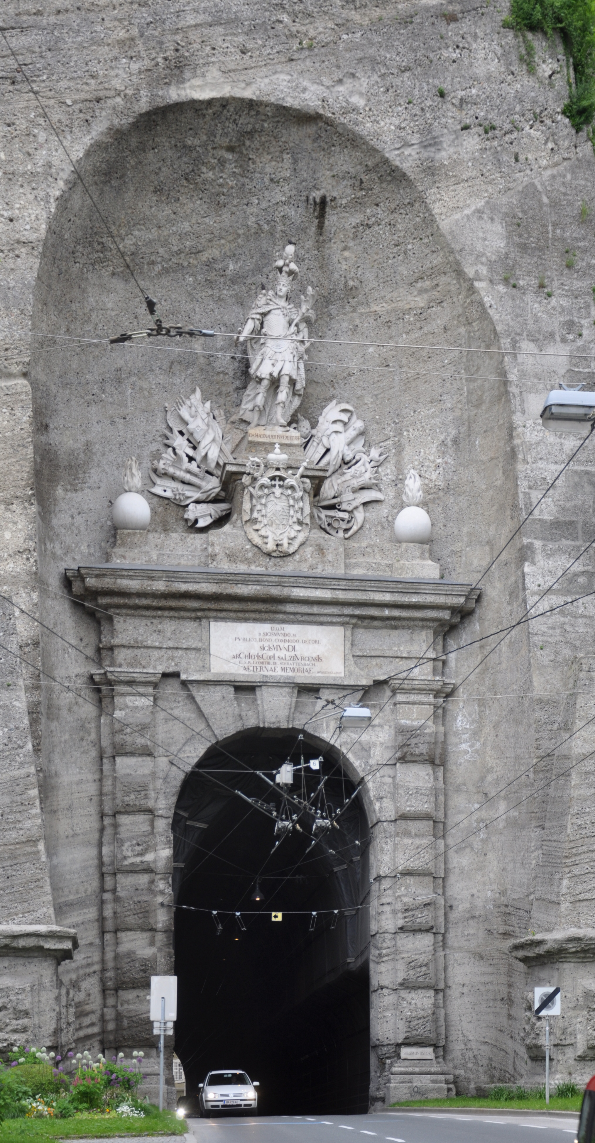 Salzburg, Sigmundstor (Neutor), Westportal (Feldseite)